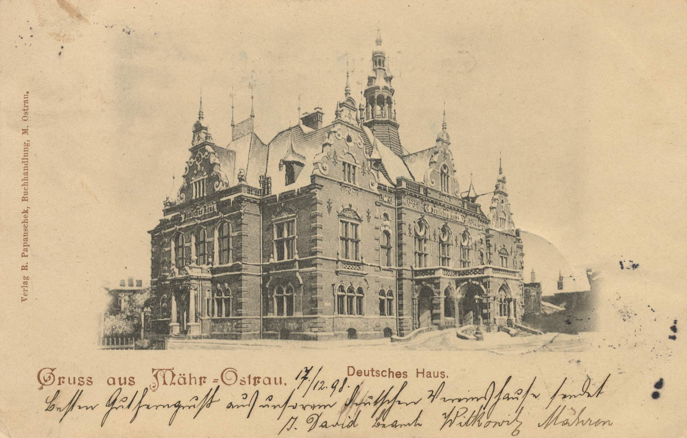 Deutsches Haus